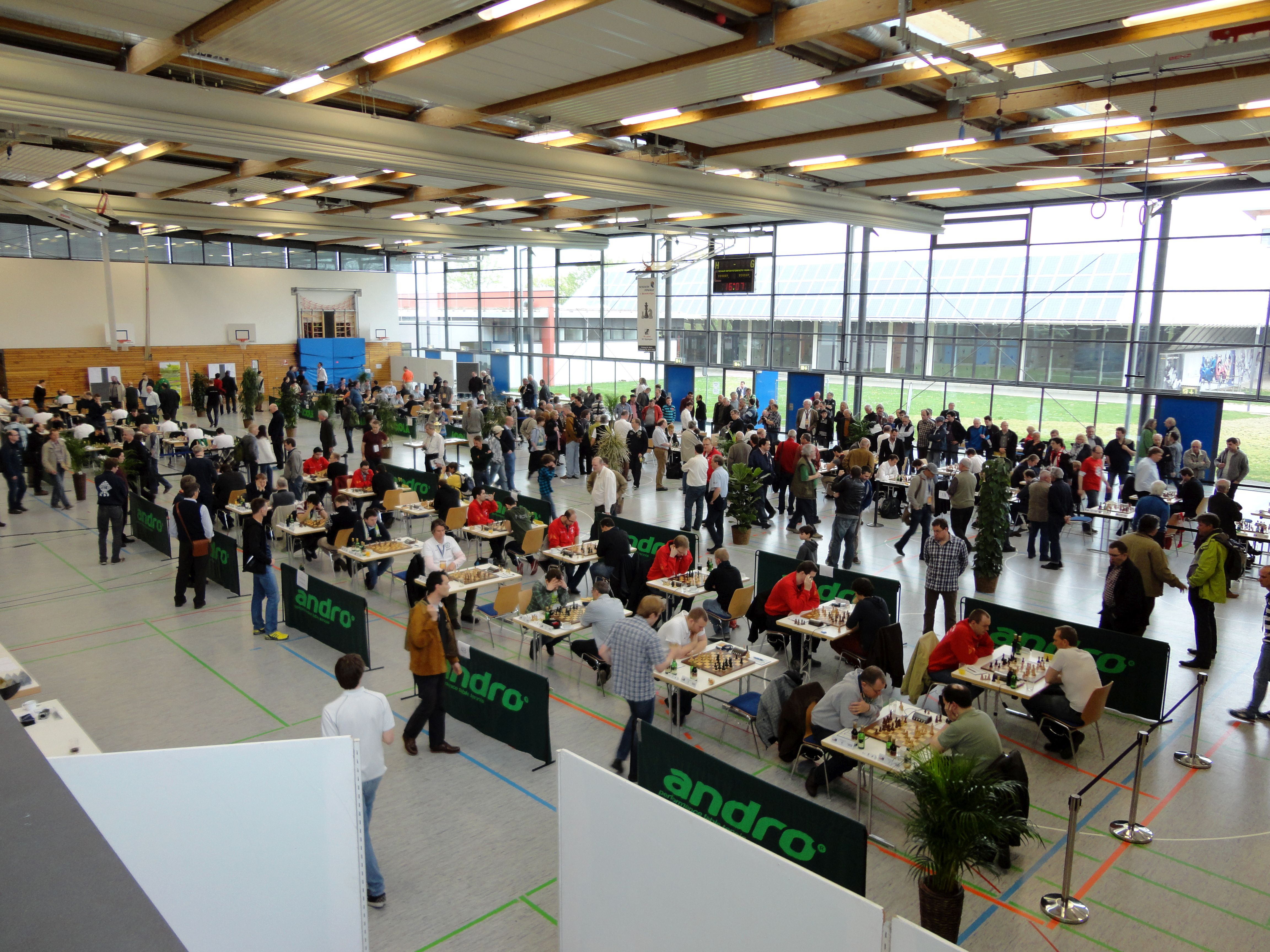 Schachbundesliga Saison 2013/2014, Finalrunden in Eppingen (Hardwaldhalle).